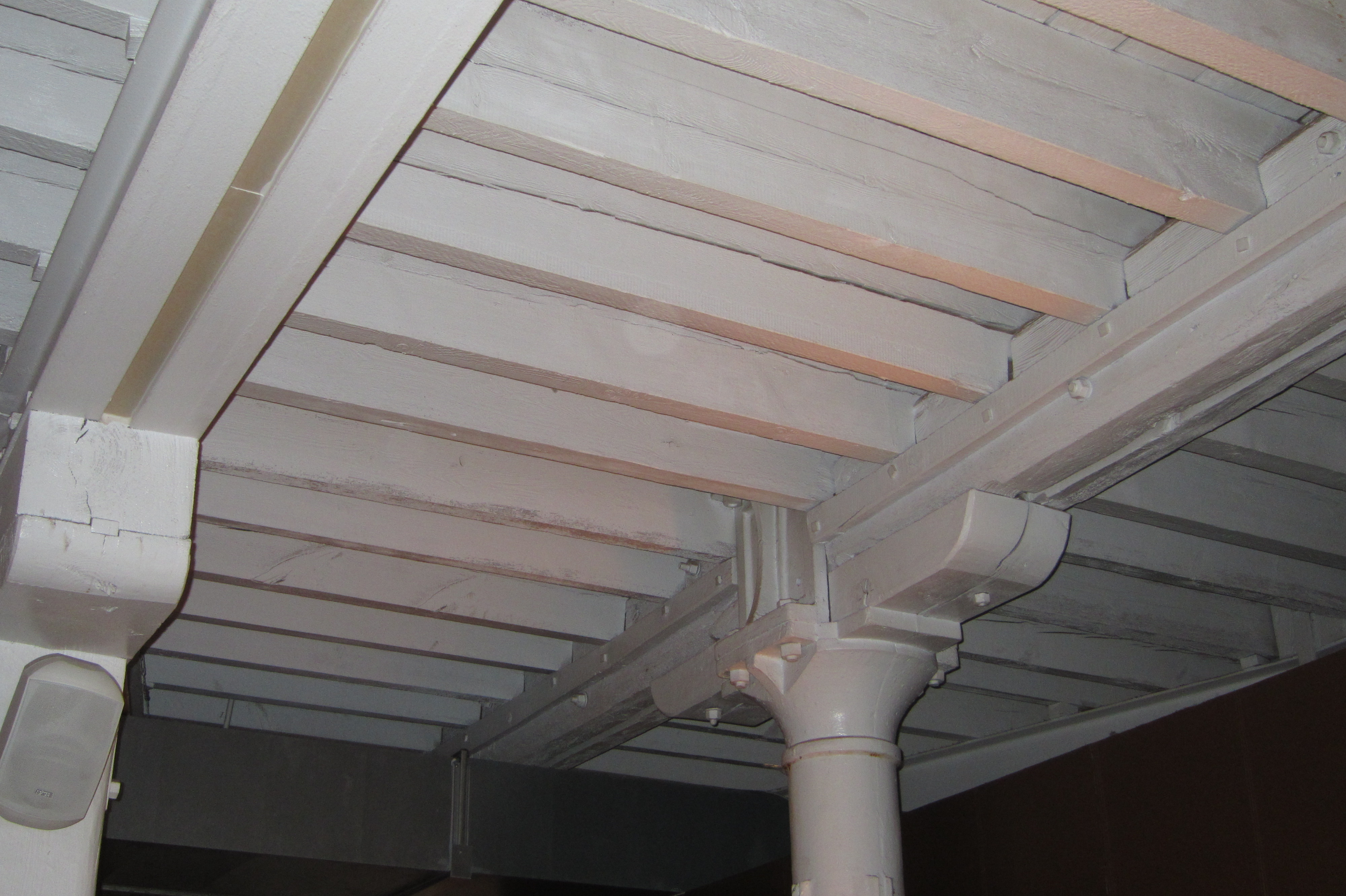 Basisstructuur gietijzeren kolommen en houten moerbalken in het Stapelhuis Sint-Felix, Godefriduskaai, Antwerpen-stad